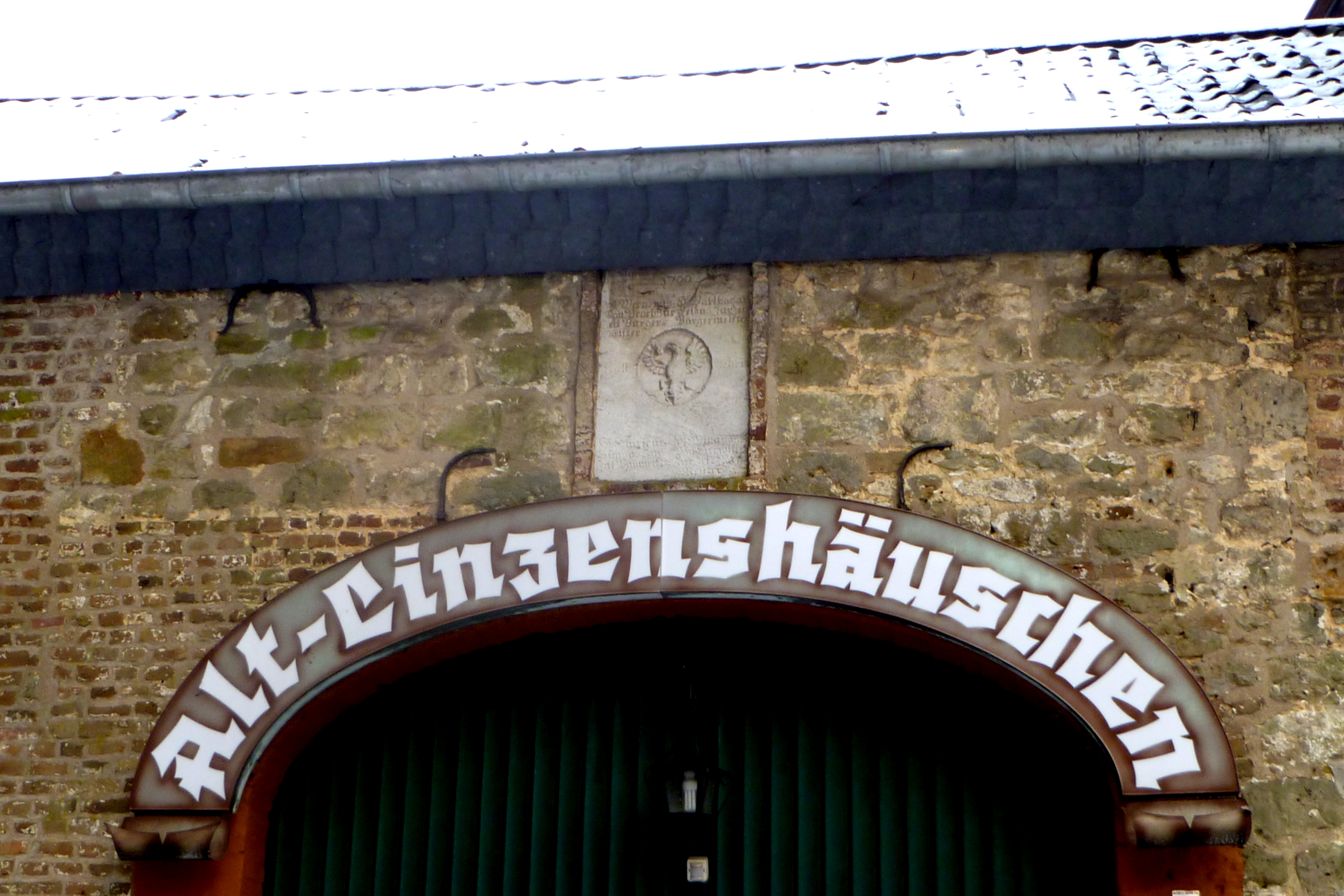 Denkmalgeschützter Schlussstein über Torbogen Alt-Linzenshäuschen